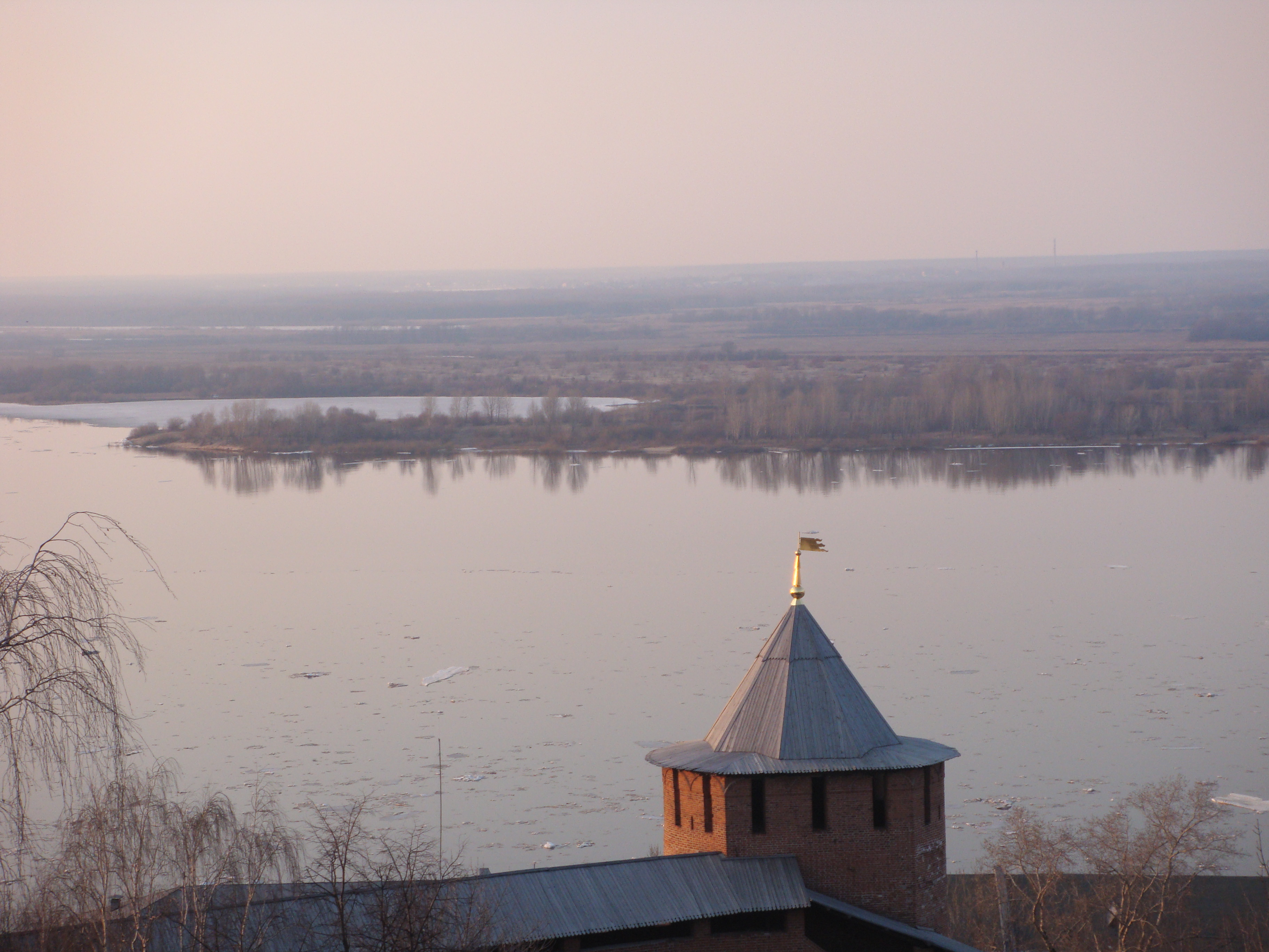 Волга